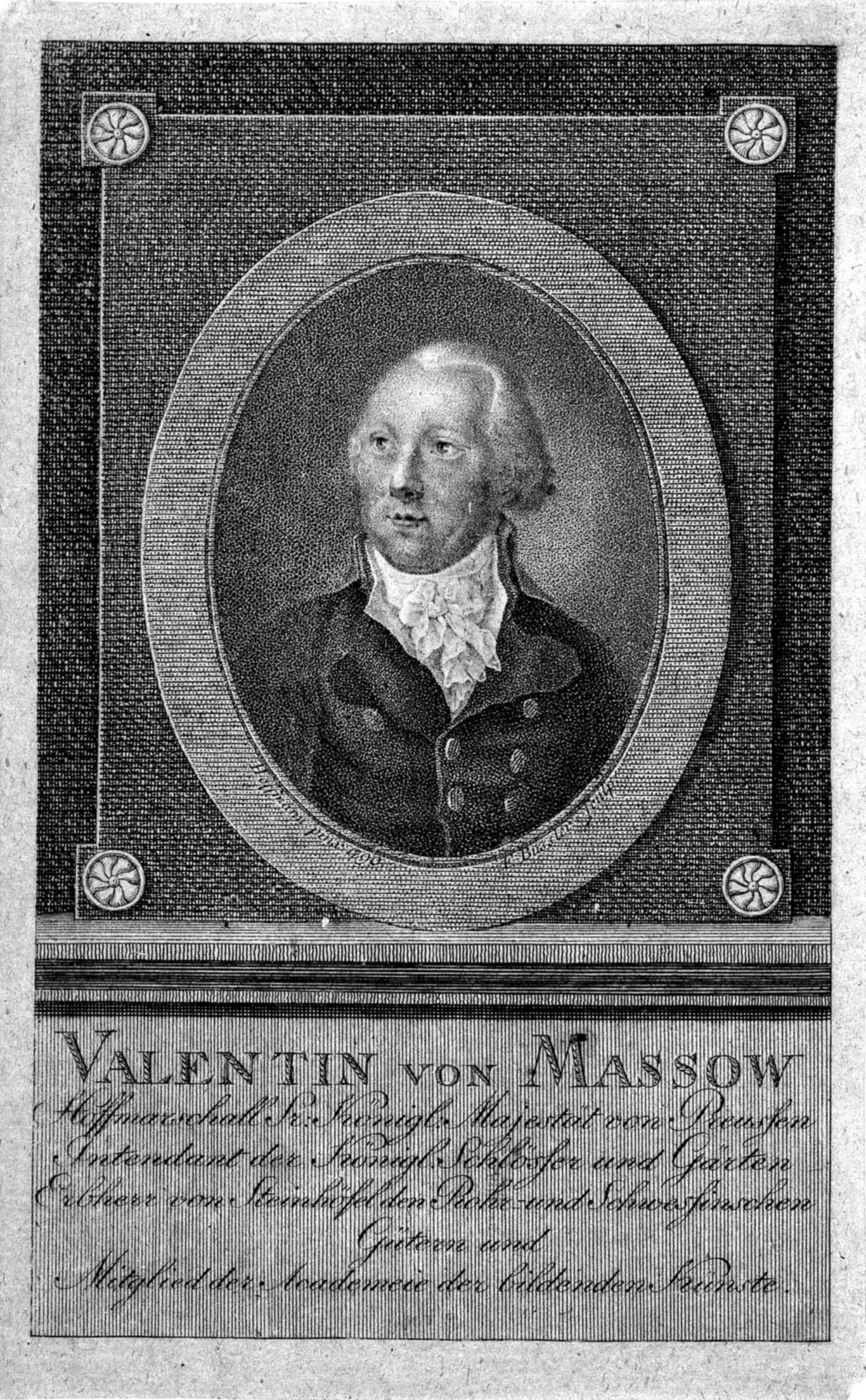 IdentificatieTitel(s): Portret van Valentin von MassowObjecttype: prent Objectnummer: RP-P-1914-2617Opschriften / Merken: verzamelaarsmerk, verso, gestempeld: Lugt 2228VervaardigingVervaardiger: prentmaker: Ernst Friedrich Bussler (vermeld op object)naar schilderij van: Hoffmann (vermeld op object)Plaats vervaardiging: Berlijn (mogelijk)Datering: 1792 - 1817Materiaal: papier Techniek: etsen / stippelwerkAfmetingen: blad: h 166 mm × b 104 mmOnderwerpWat: historical personsWie: Valentin von MassowVerwerving en rechtenVerwerving: aankoop 1905Copyright: Publiek domein